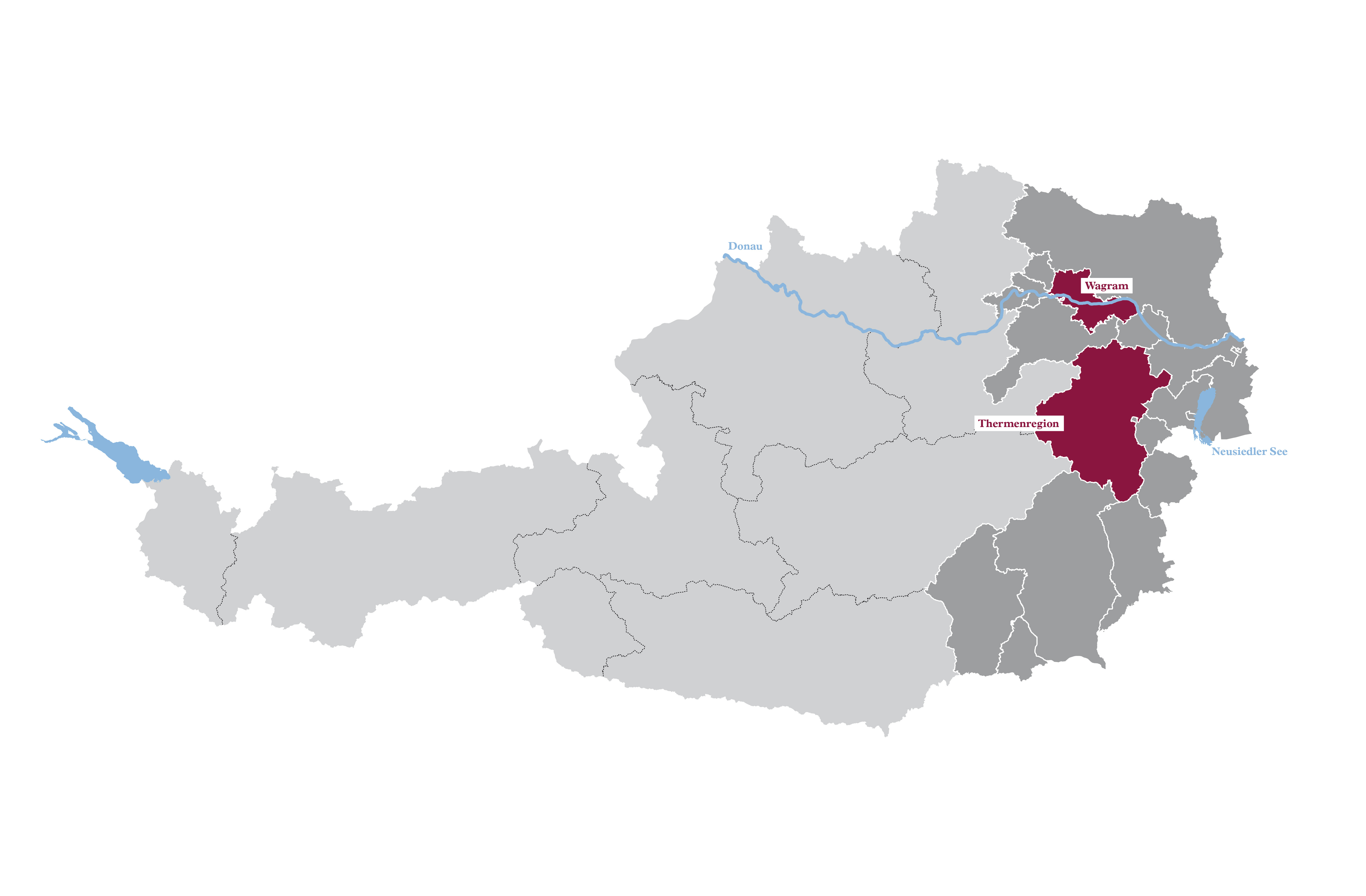 Österreichs Weinbaugebiete mit Fokusrebsorten (nicht DAC-Status; rot) vom Mai 2020.